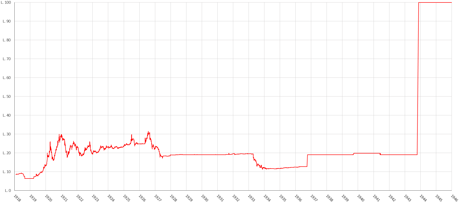 Grafico del cambio Lira/Dollaro dal 1 febbraio 1918 al 6 febbraio 1946